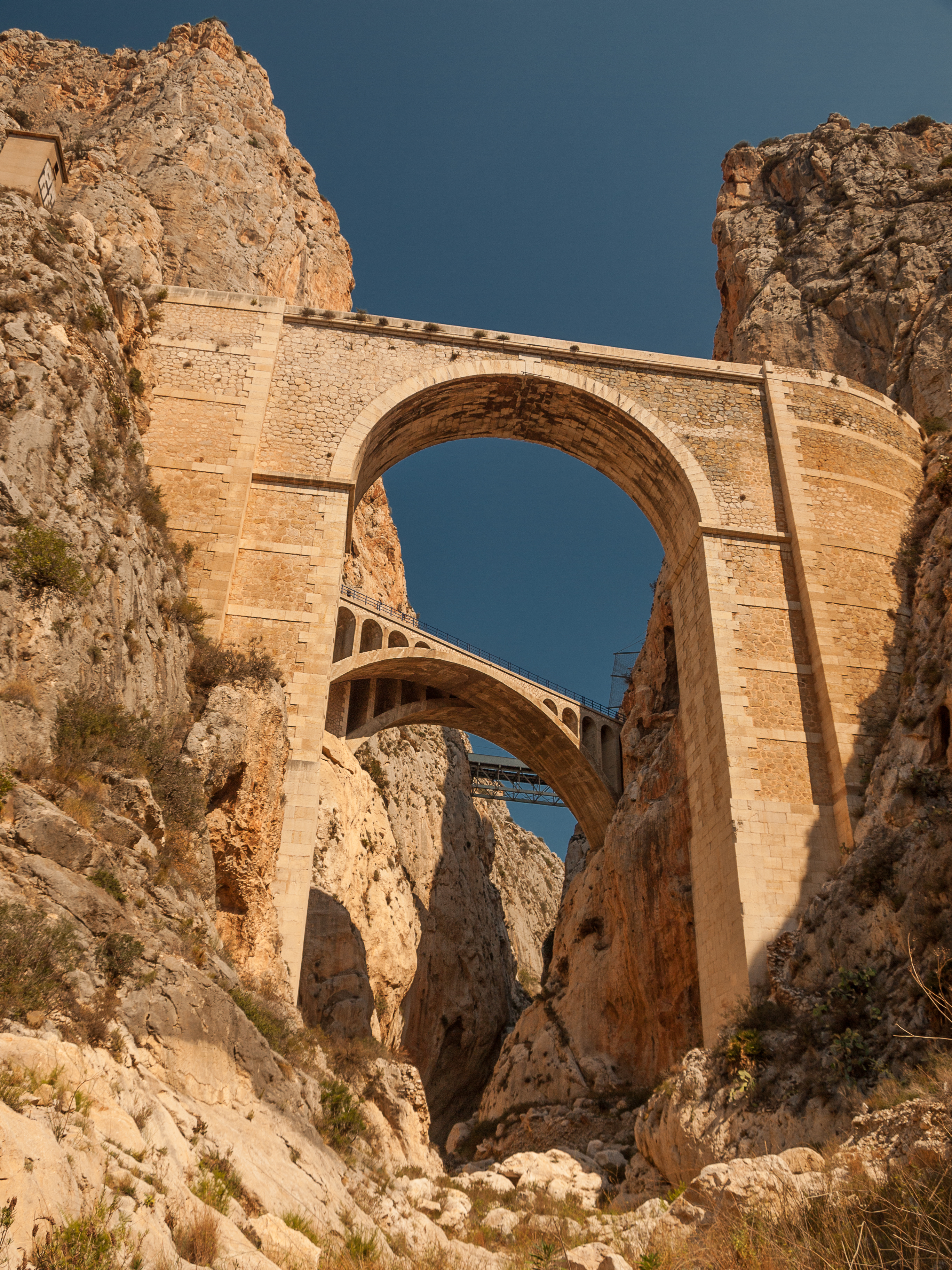 El Mascarat - Puentes